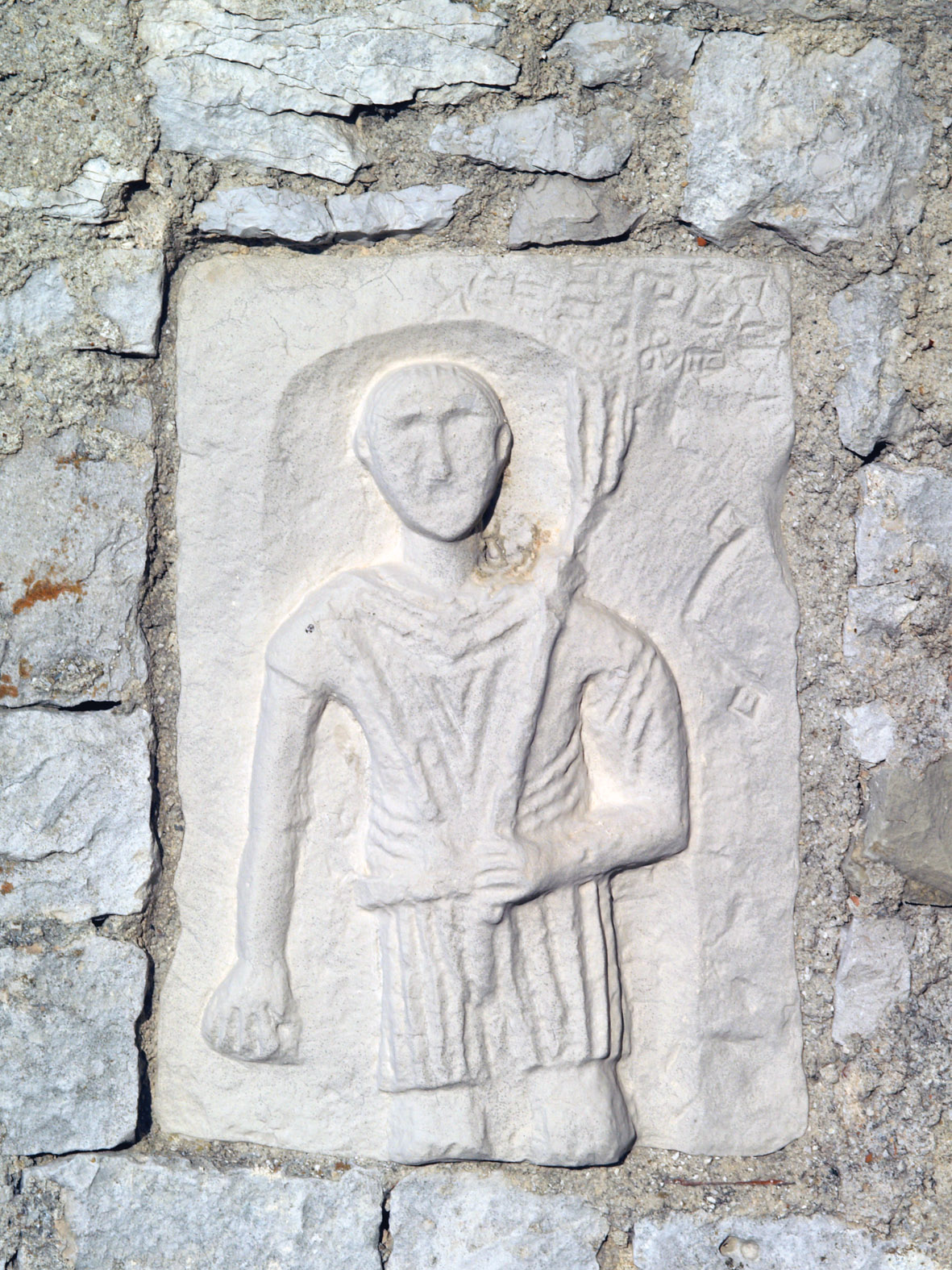 Plominski natpis uzidan je na vanjskom zidu crkve sv. Jurja u Plominu. Ploča je iz 11. stoljeća, a prikazuje ilirsko-rimskog boga flore i faune Silvana. Natpis je na glagoljici: "Ovo je pisao S." Stari Plominjani su držali kako je to prikaz sv.Jurja, čiji se katolički blagdan obilježava 23. travnja te su njegovim imenom nazvali crkvu.